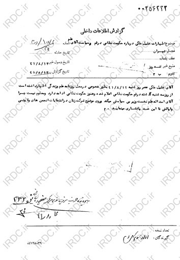 نامه ساواك تهران در خصوص اظهارات خلیل ملكی